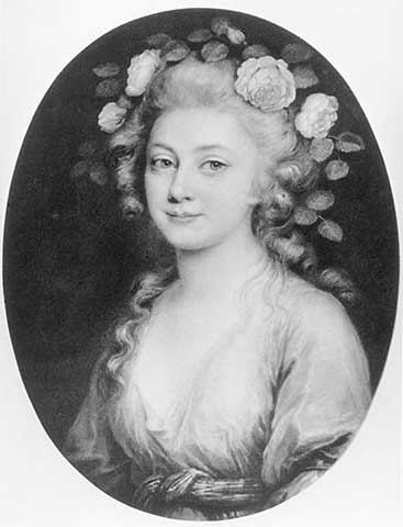 Friederike Luise Dorothea Philippine von Preußen (1770–1836)